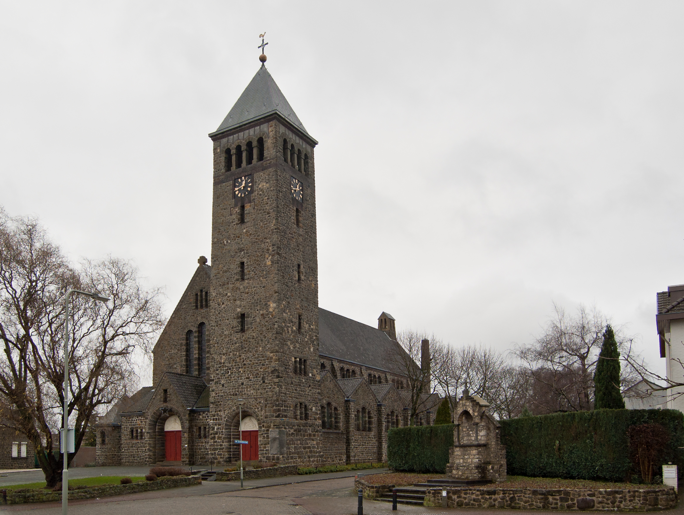 Limbricht, Provinz Limburg, Niederlande: Salviuskerk (1922, Architekt: Joseph Cuypers, unter Mitarbeit seines Sohnes Pierre Cuypers jun.)